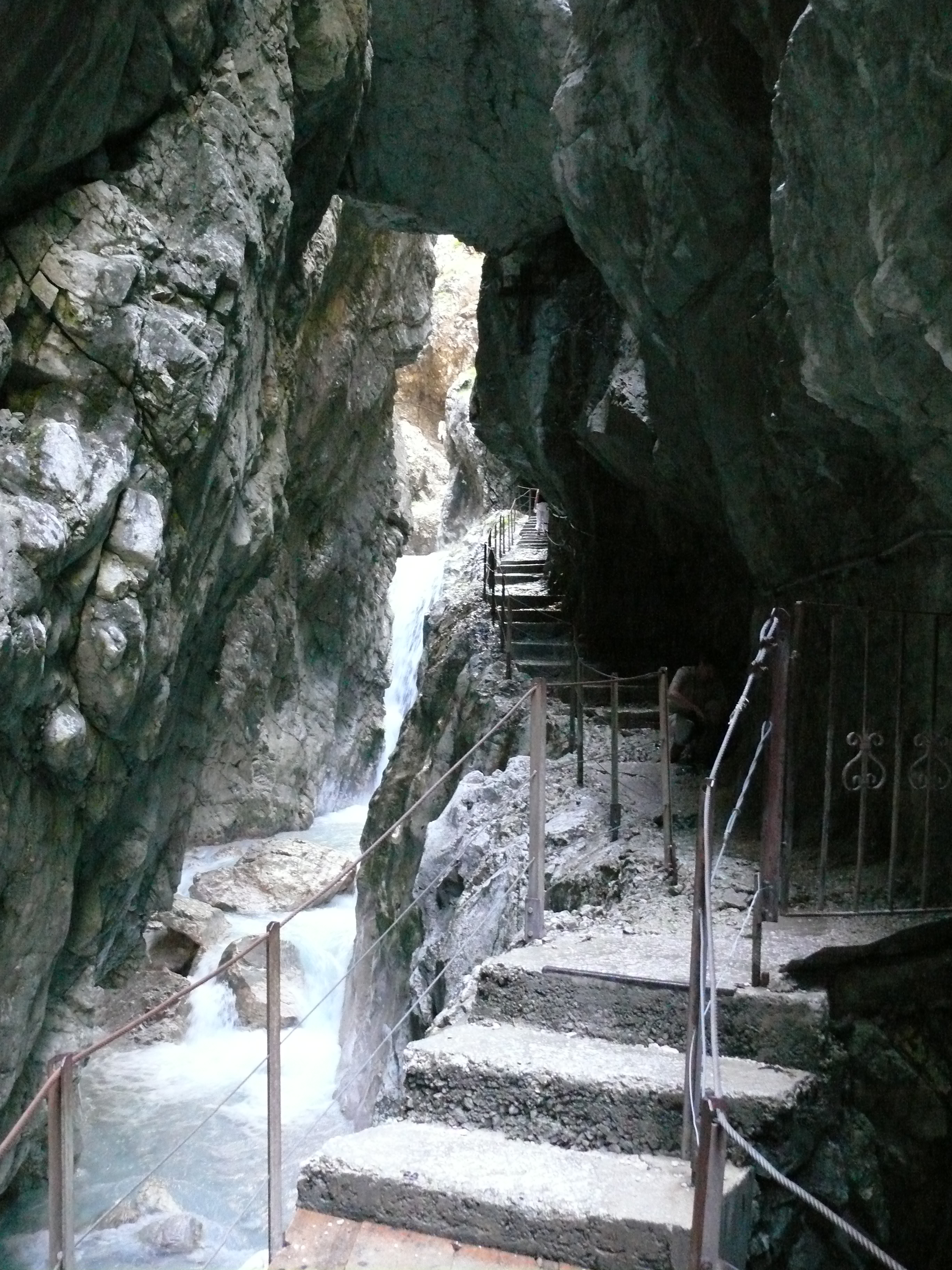 In der Höllentalklamm